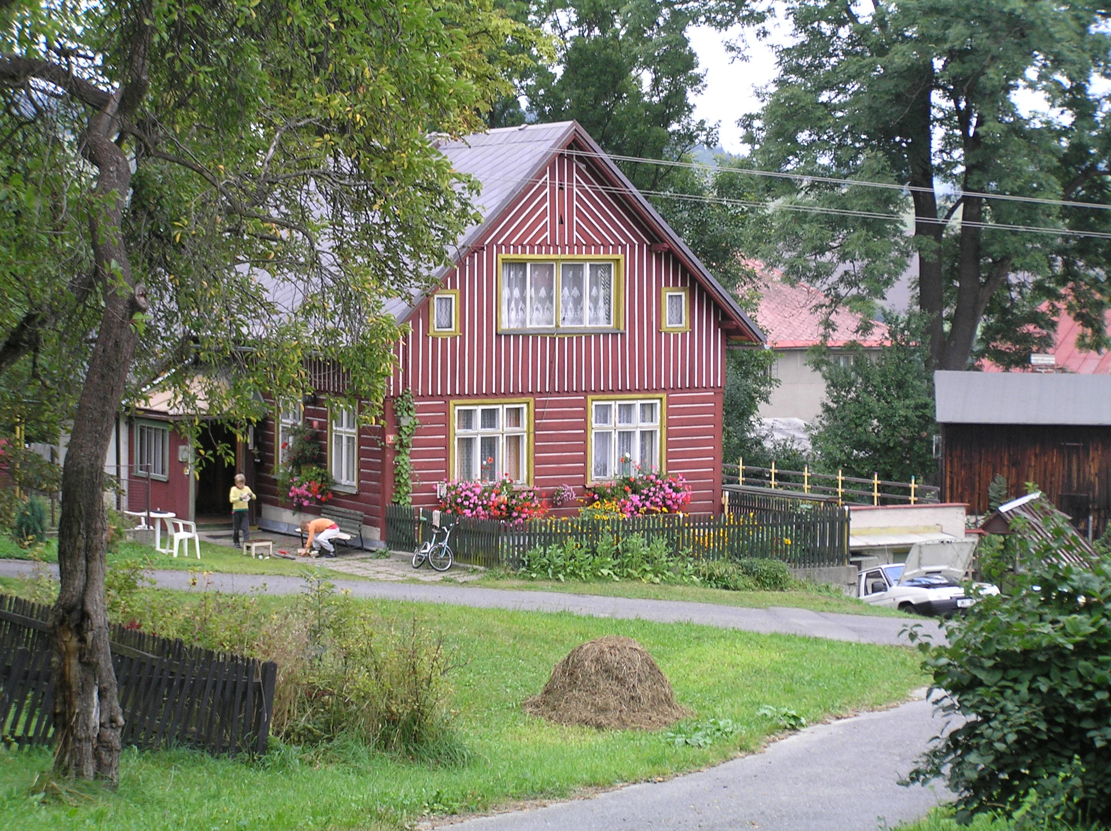 Chlístov (lidová architektura)